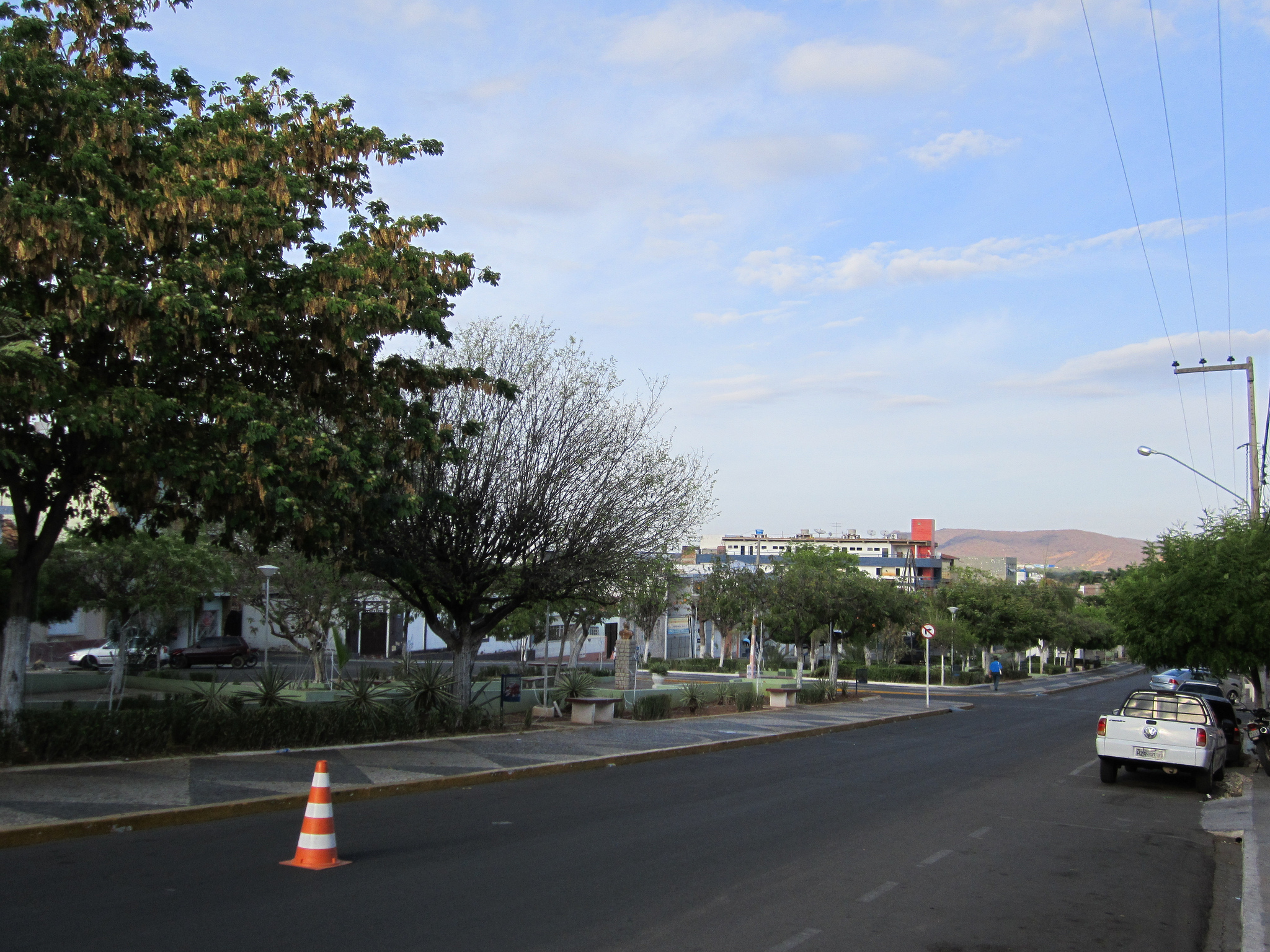 Praça Barão do Pajeú - Serra Talhada - Pernambuco - Brasil